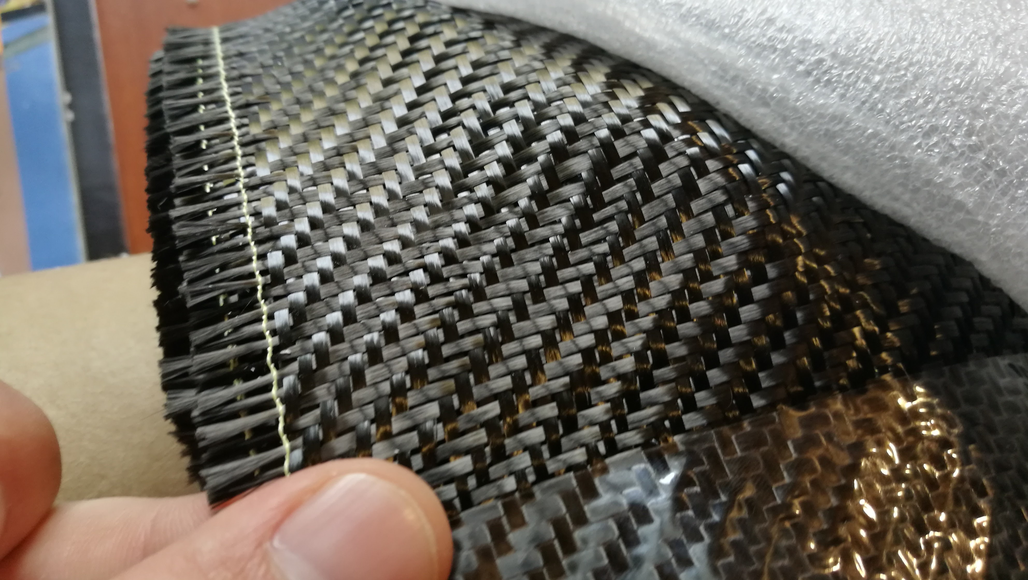 Углеродная ткань плотностью 200 гр/м2